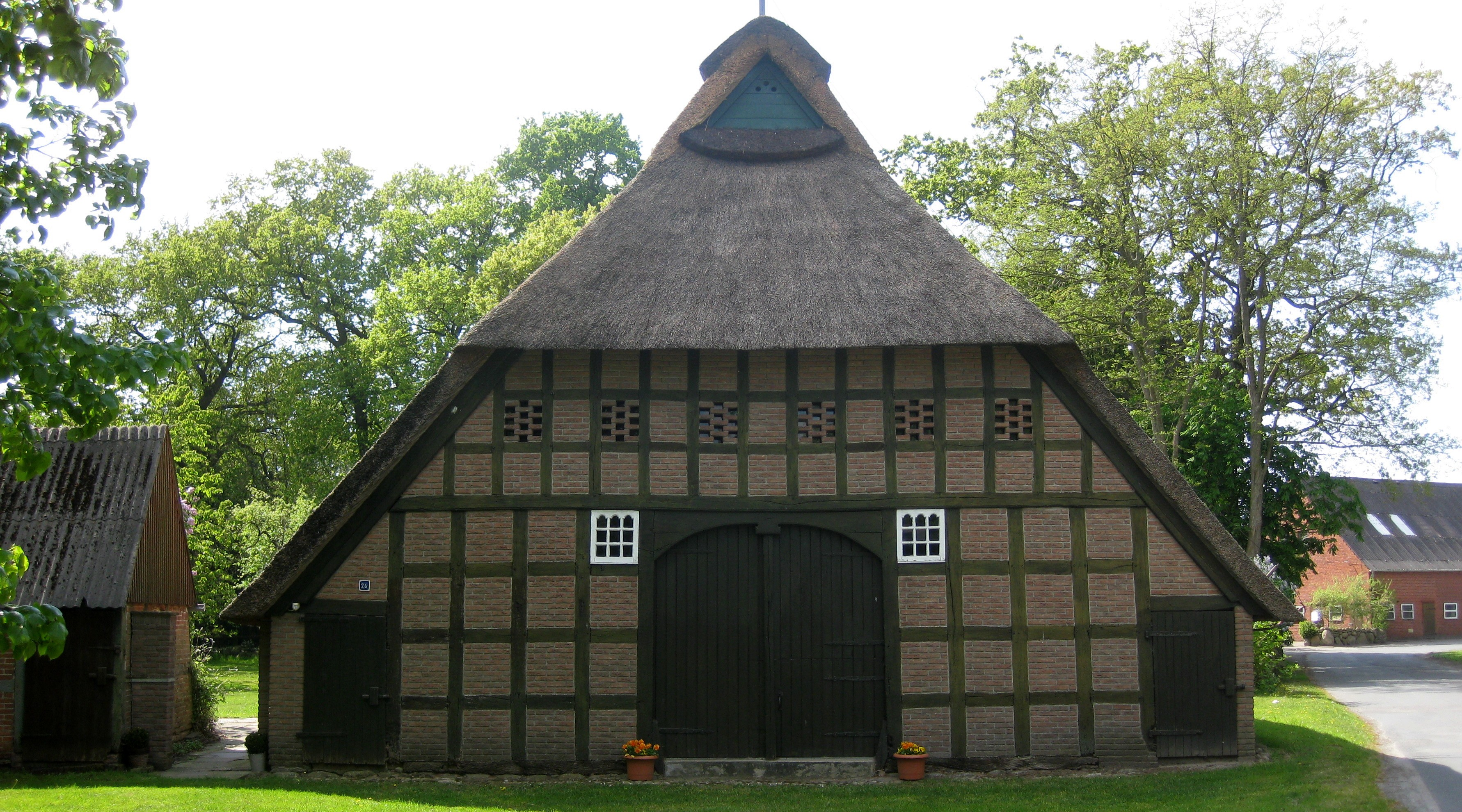 Fachwerkhaus Lange Str. 26 (jetzt Freschluneberger Straße 26) in Freschluneberg (Lunestedt)